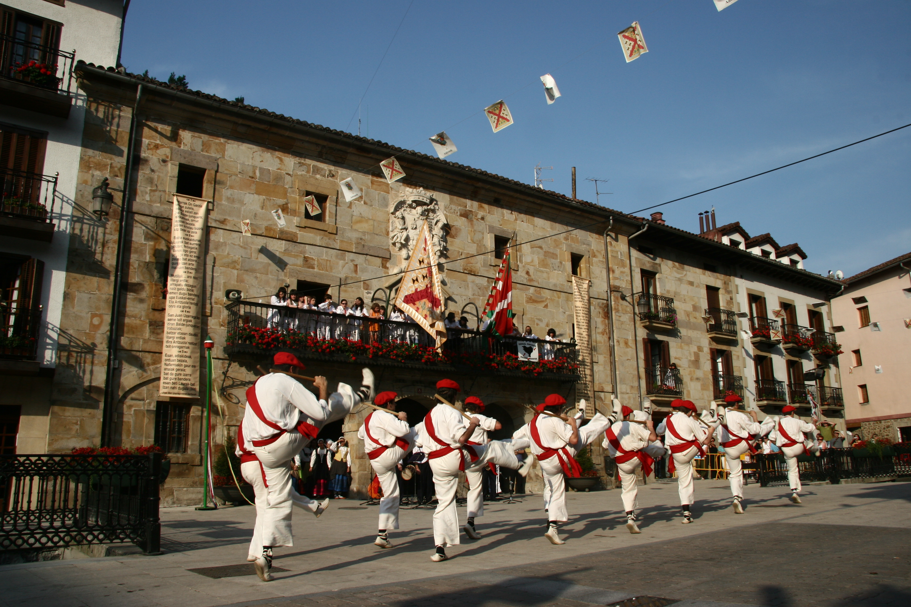 Antzuolako Mairuen Alardea, 2008an.